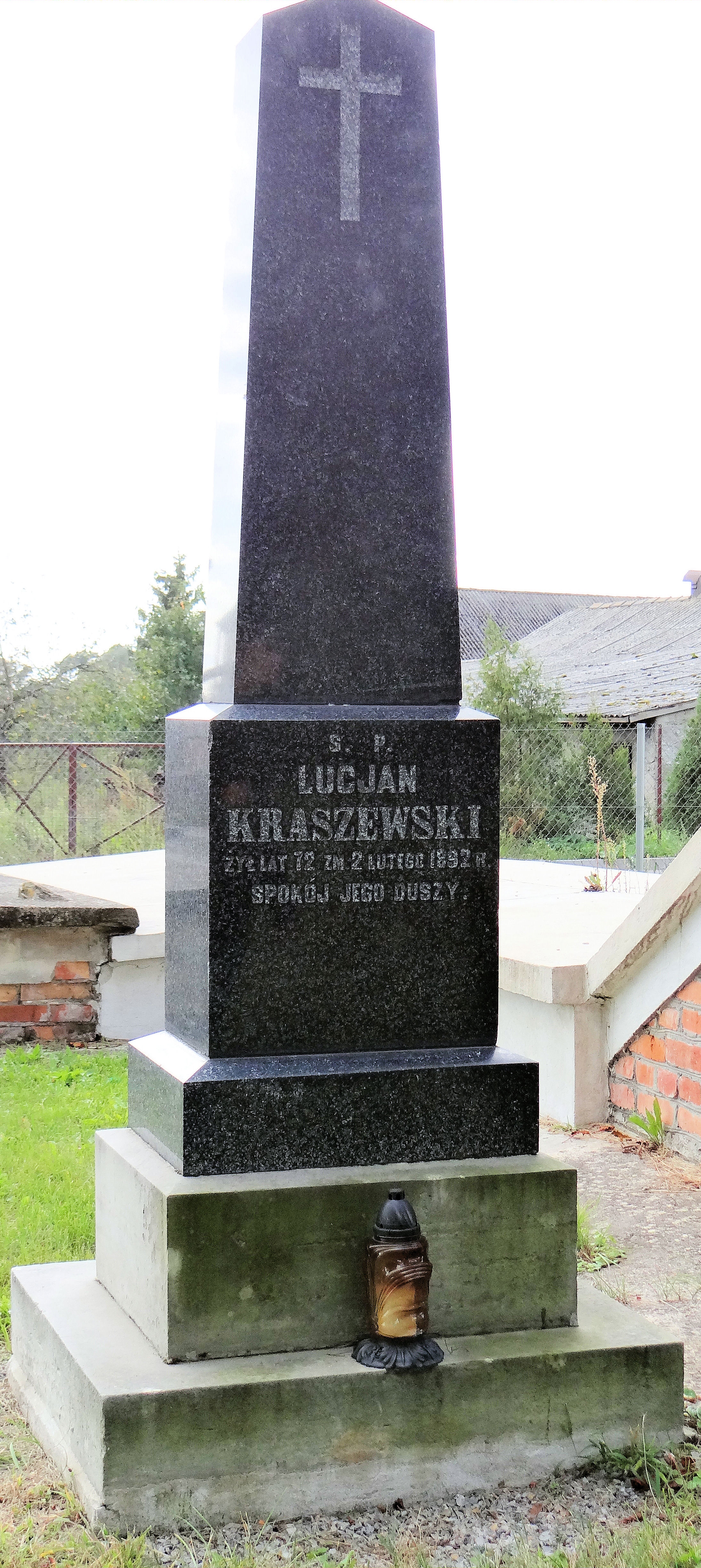 Zabytkowy cmentarz w Wisznicach - grobowiec rodziny Kraszewskich - obelisk nagrobny Lucjana Kraszewskiego